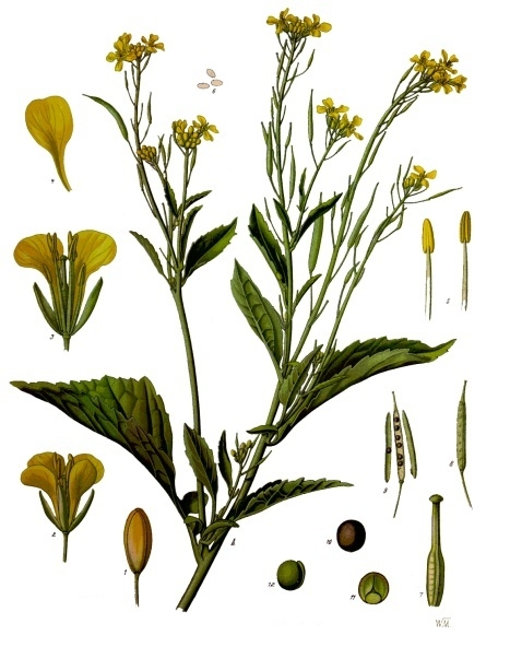 Sareptasenf. A oberer Theil der Pflanze mit Blüthen und Früchten, natürl. Grösse; 1 Blüthenknospe, vergrössert; 2 Blüthe, desgl.; 3 dieselbe im Längsschnitt, desgl.; 4 Kronblatt, desgl.; 5 Staubgefässe von verschiedenen Seiten, desgl.; 6 Pollen, desgl.; 7 Stempel, desgl.; 8 Frucht, natürl. Grösse; 9 dieselbe geöffnet, desgl.; 10 Same, vergrössert; 11, 12 derselbe ohne Samenschale, desgl.